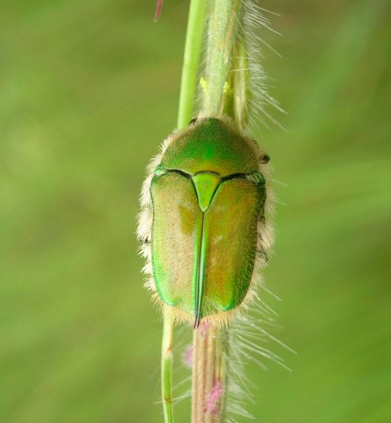 Chiloloba acuta, Cetoniinae, Scarabaeidae